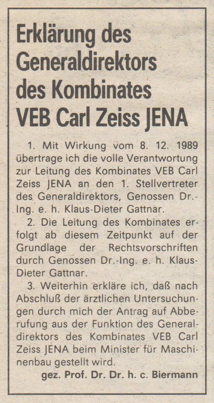 Zeitungsartikel in der Betriebszeitung Roter Blitz des VEB Elektromat Dresden vom 19. Dezember 1989 mit der Rücktrittserklärung vom Generaldirektor Prof. Dr. Dr. h. c. Wolfgang Biermann.